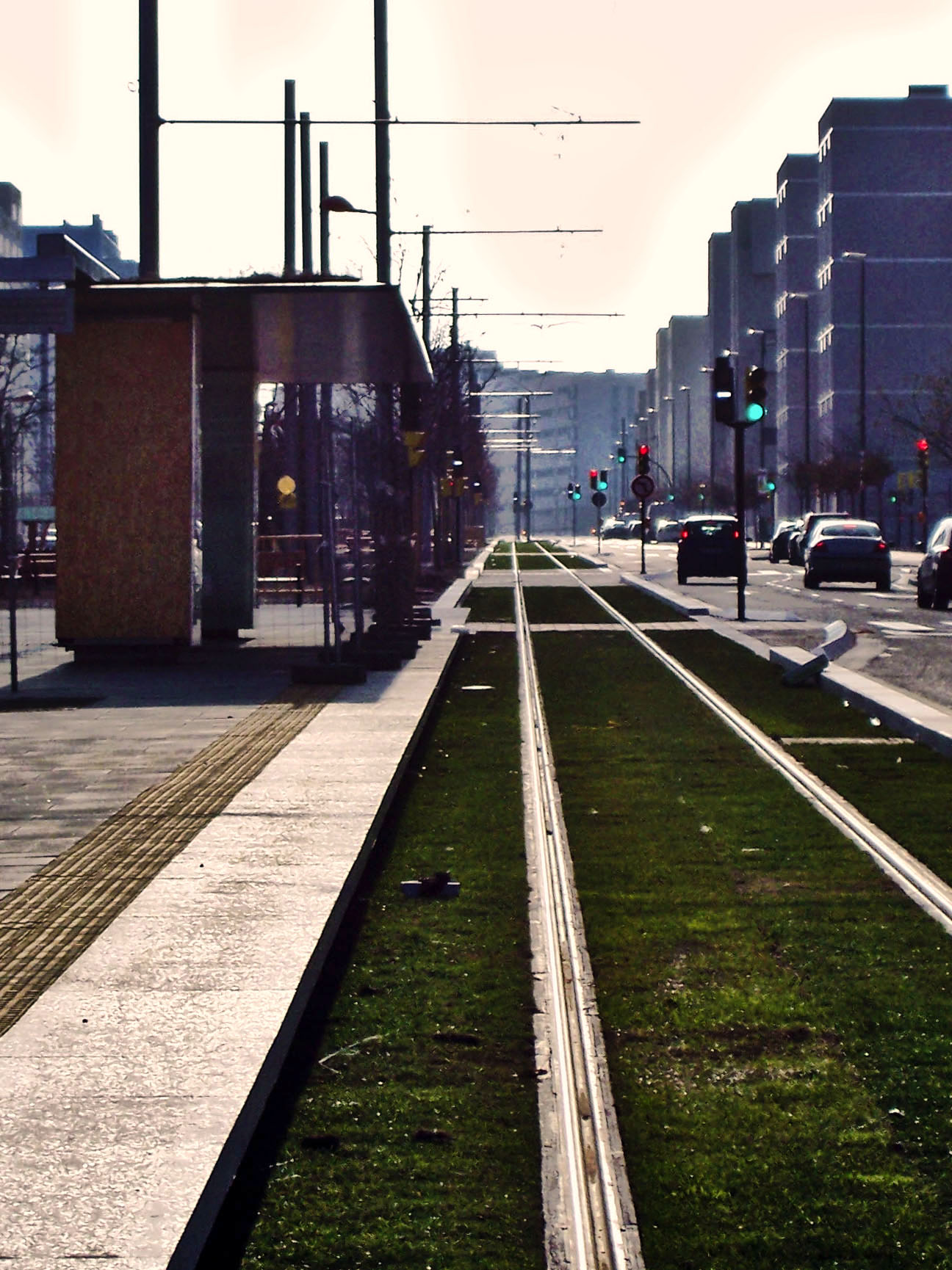 Vías del Tranvía de Zaragoza